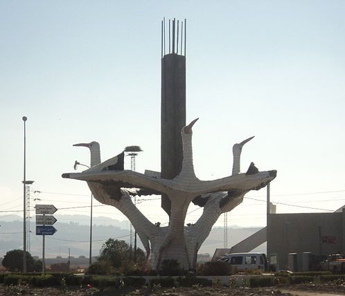 Entrée de ville de Béja